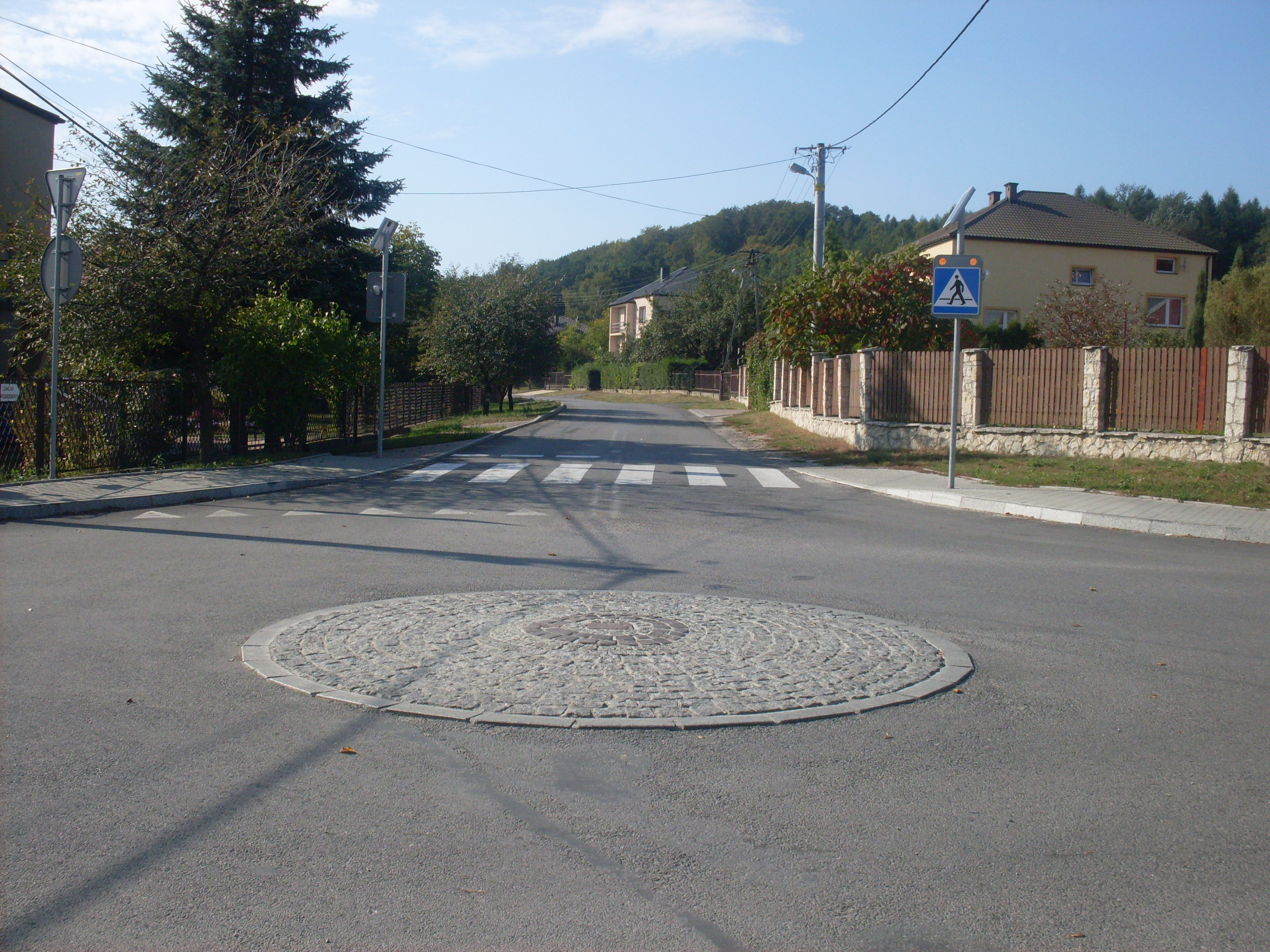 Tenczynek Rondo.Widok na ul. Sobieskiego (cz. zachodnia)